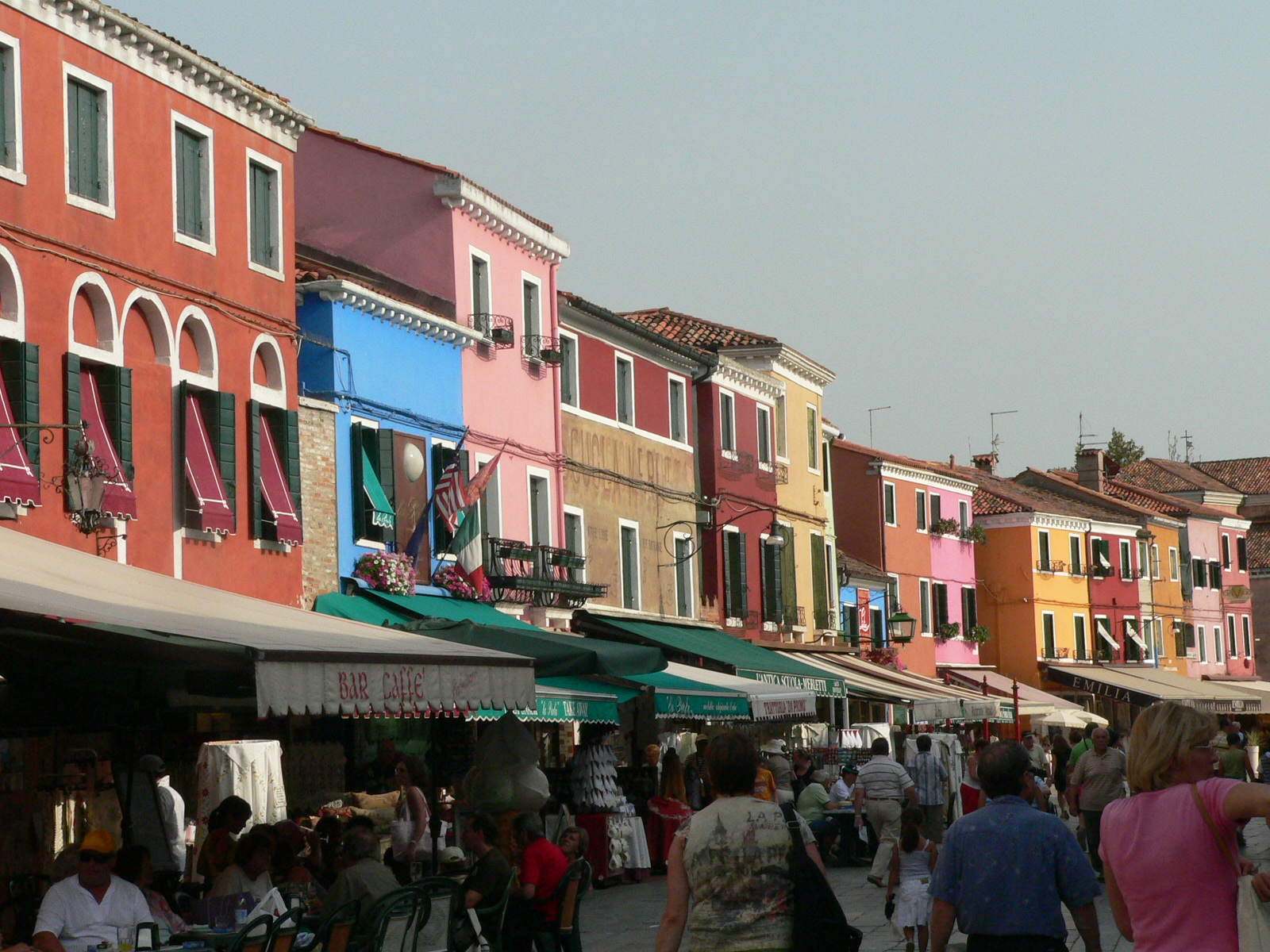 Burano, Via Galuppi